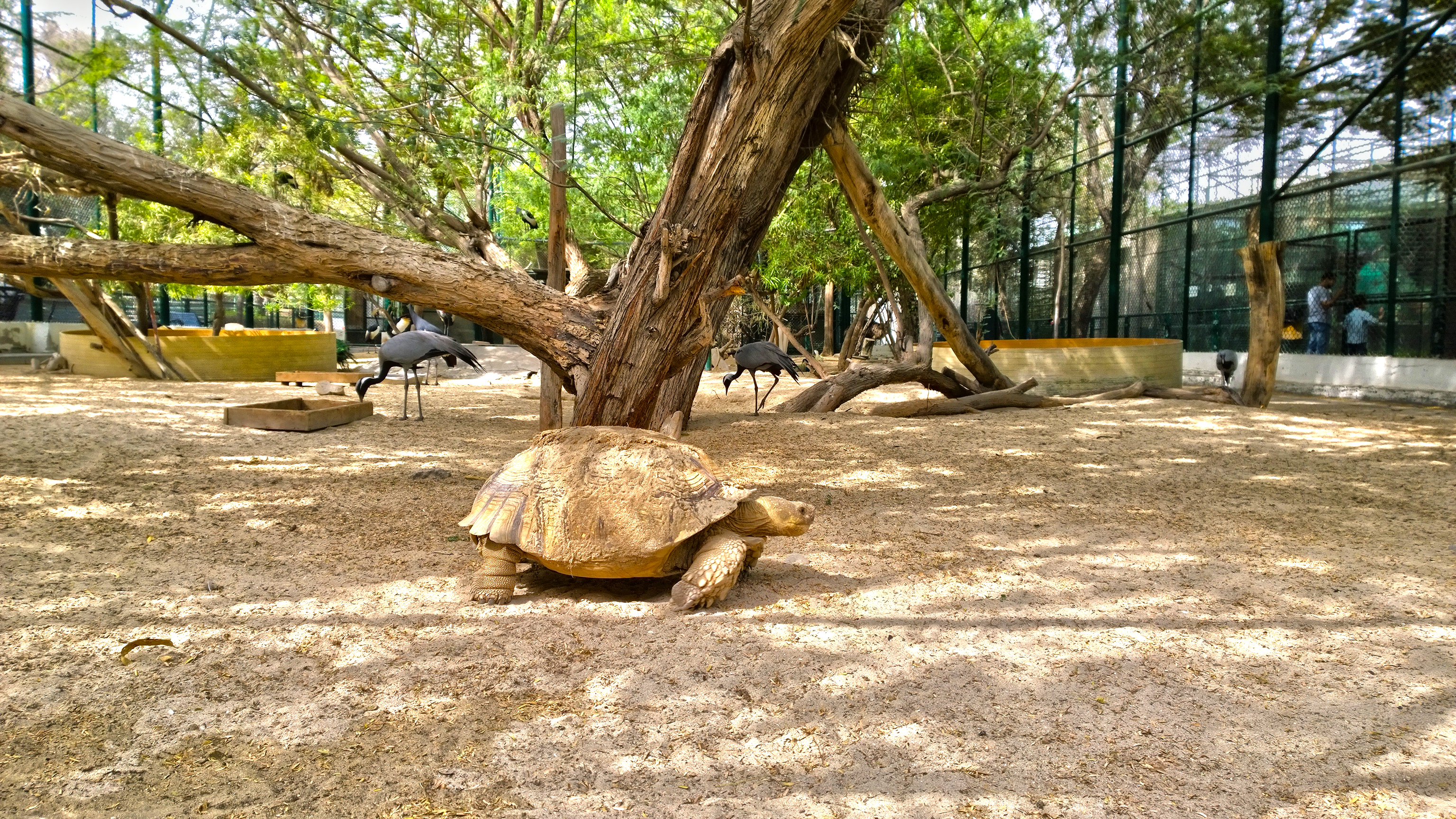 Turtle at Dubai Zoo.